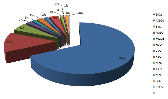 Хімічний склад чечвинських туфів. Кругова діаграма хімічного чвинських туфів (середнє з 16 аналізів)